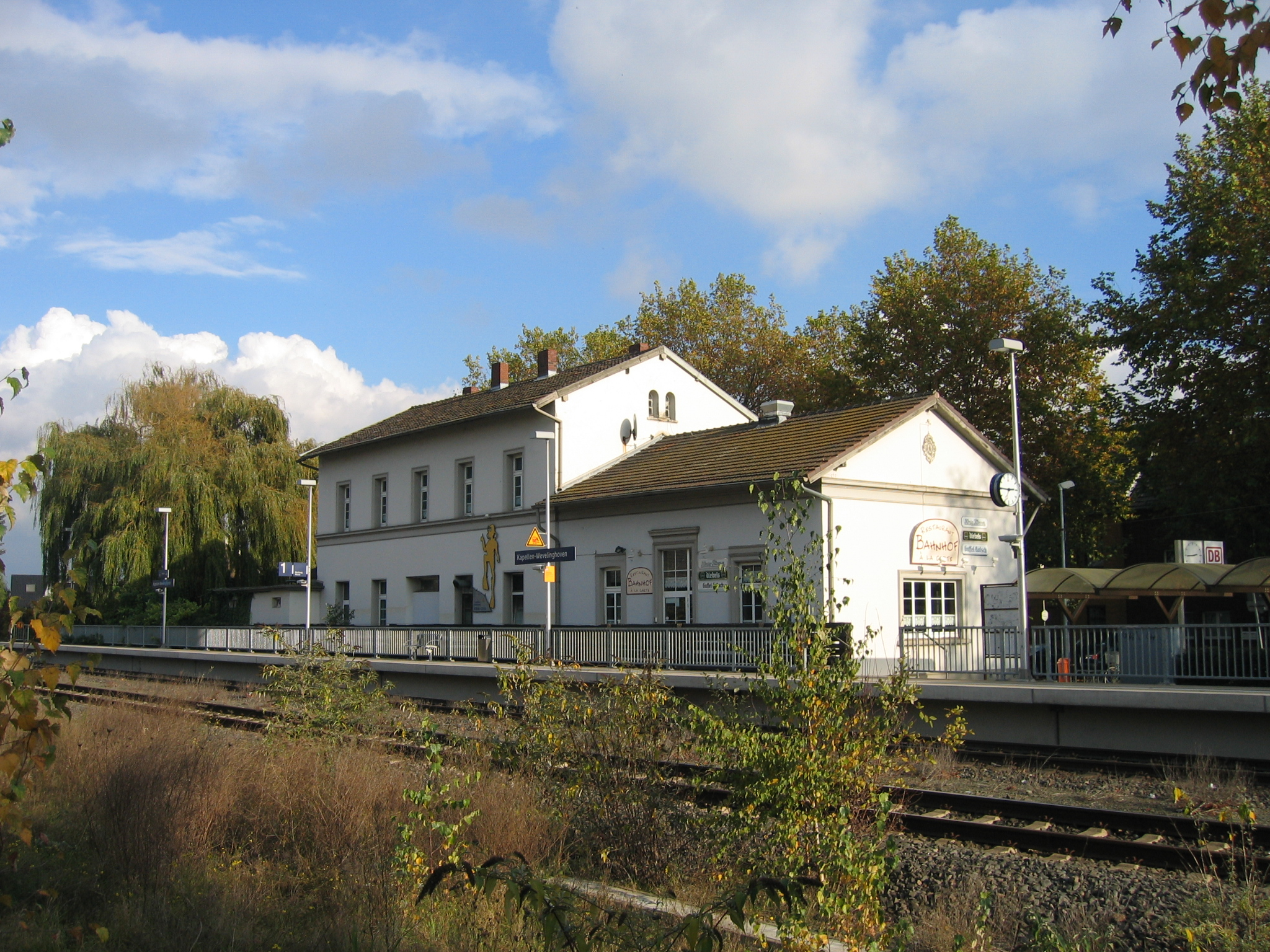 Haltepunkt Kapellen-Wevelinghoven an der Erftstrecke.